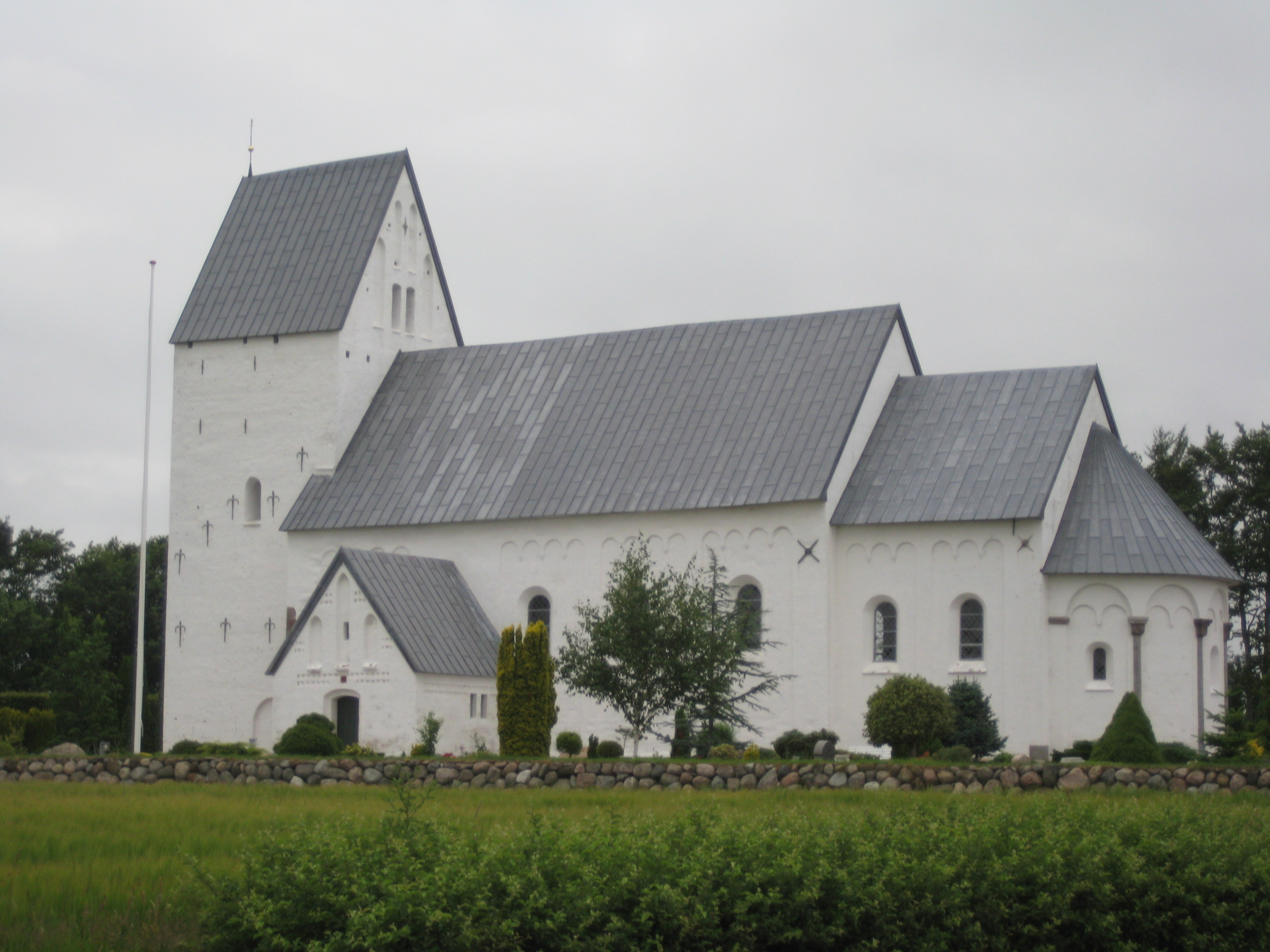 Jernved Kirke set fra vejen